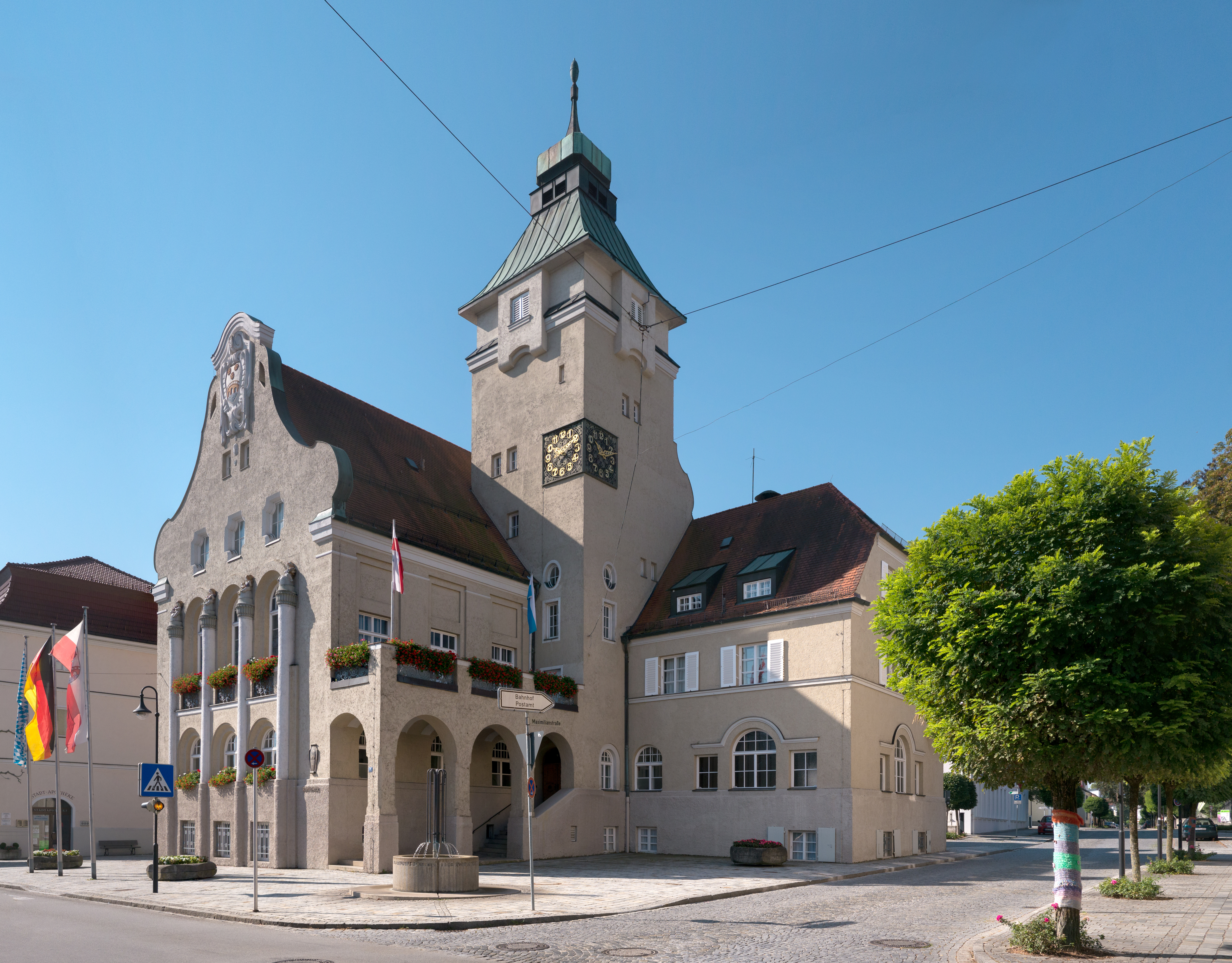 Simbach am Inn: RathausThis is a photograph of an architectural monument.